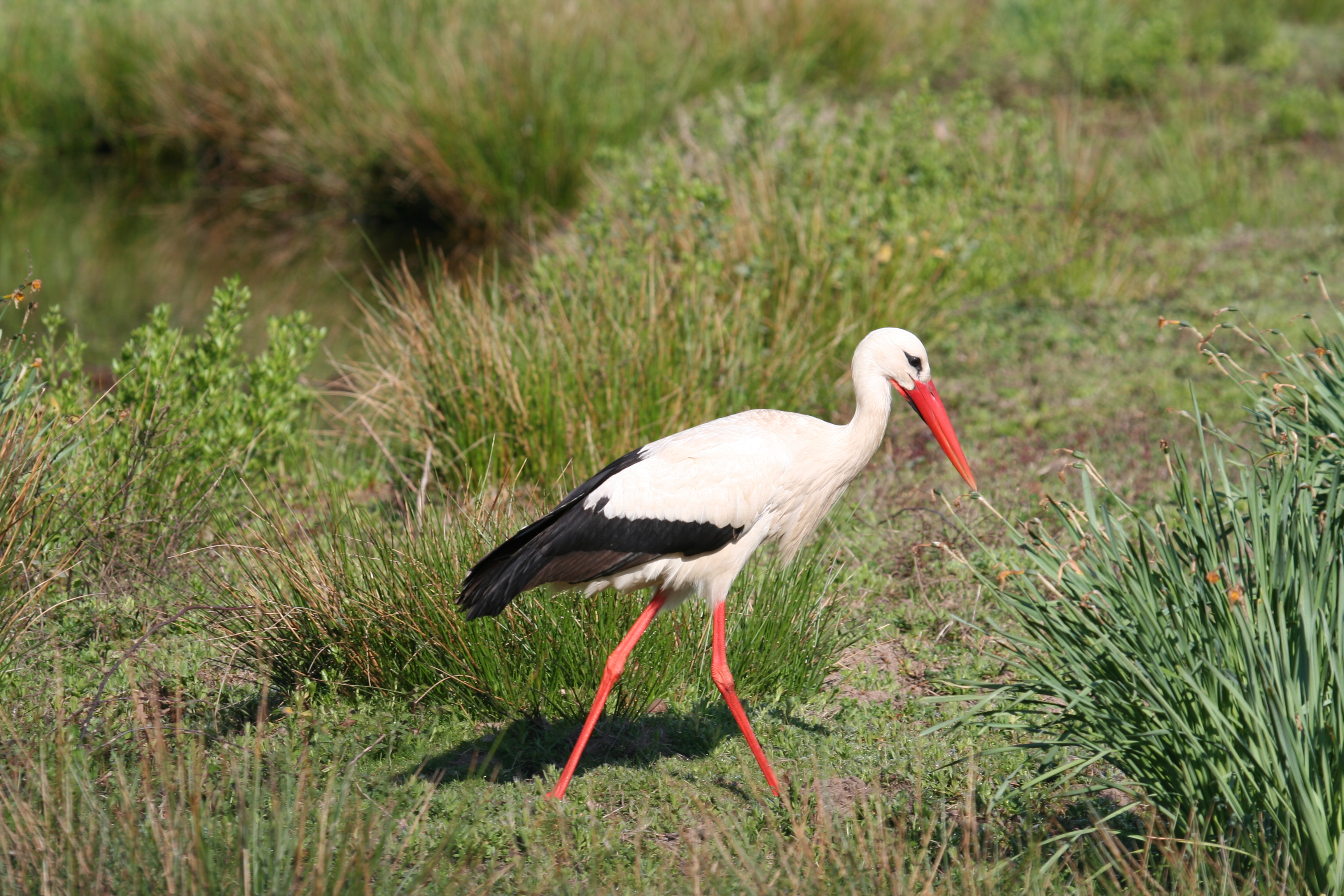 Storch